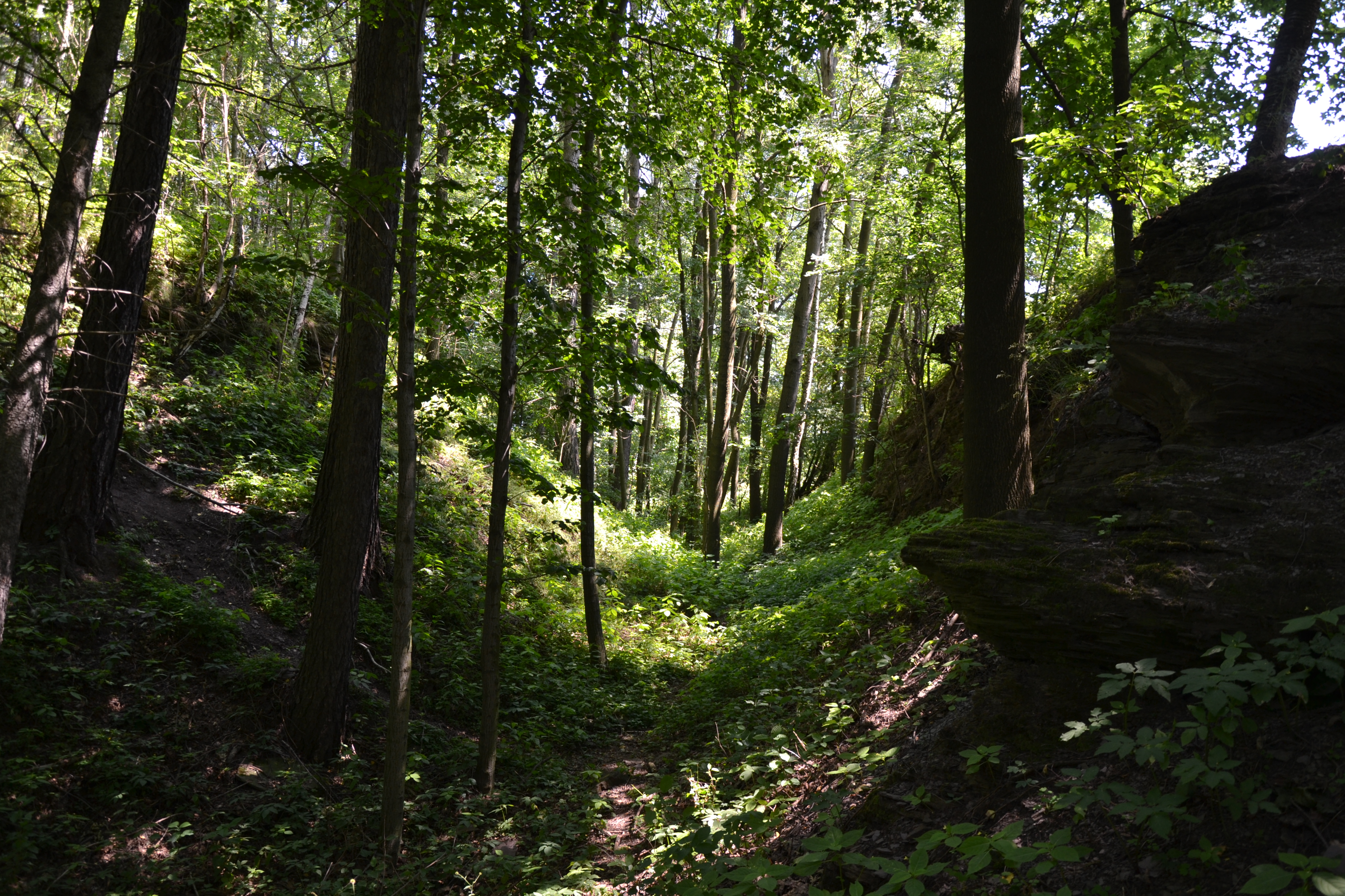 Hrad Košťálov, zřícenina (Košťálov), v dolní části obce, Košťálov